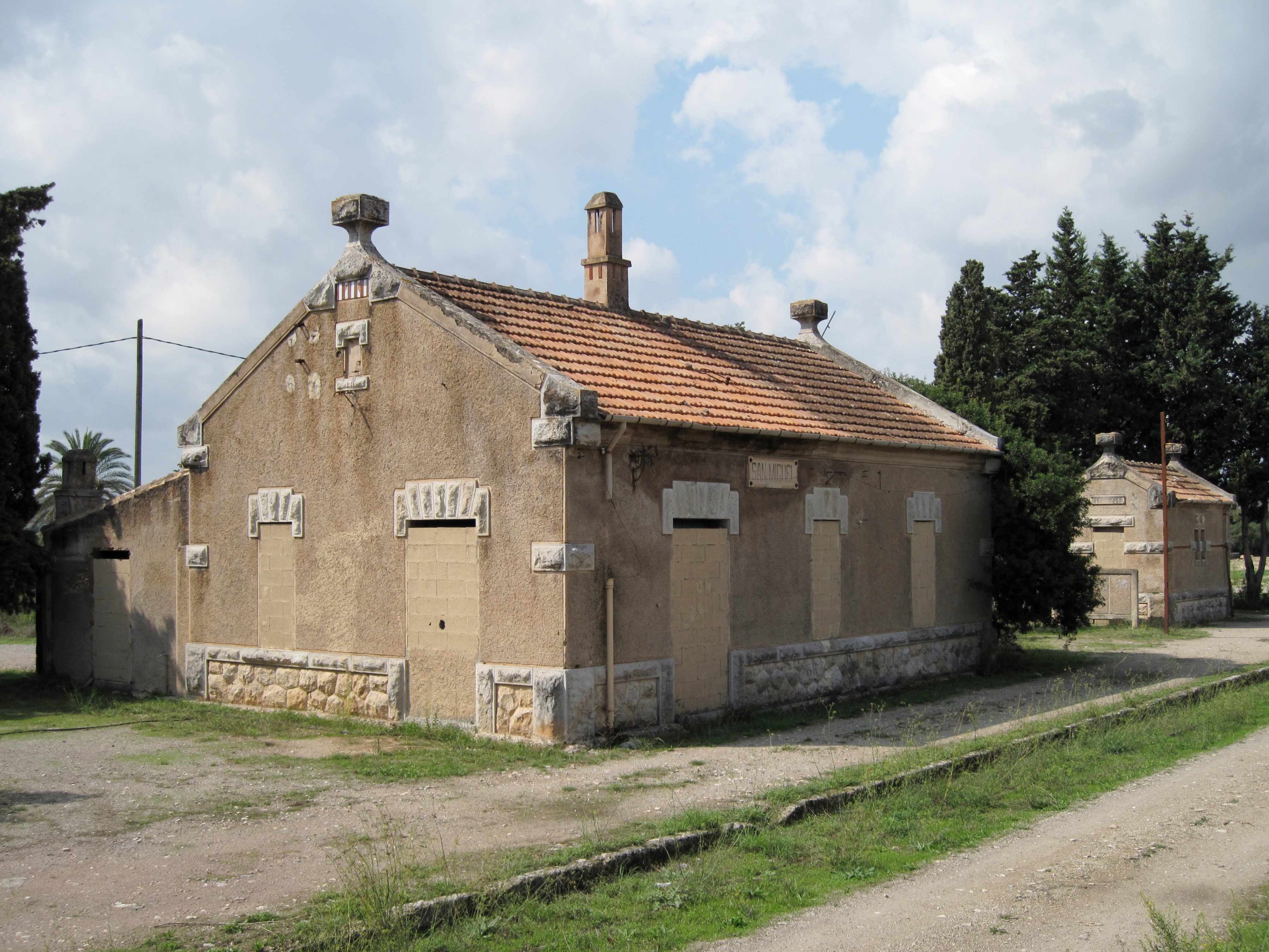 Alter Bahnhof San Miguel (Sant Miquel) in Son Carrió, Mallorca, Spanien